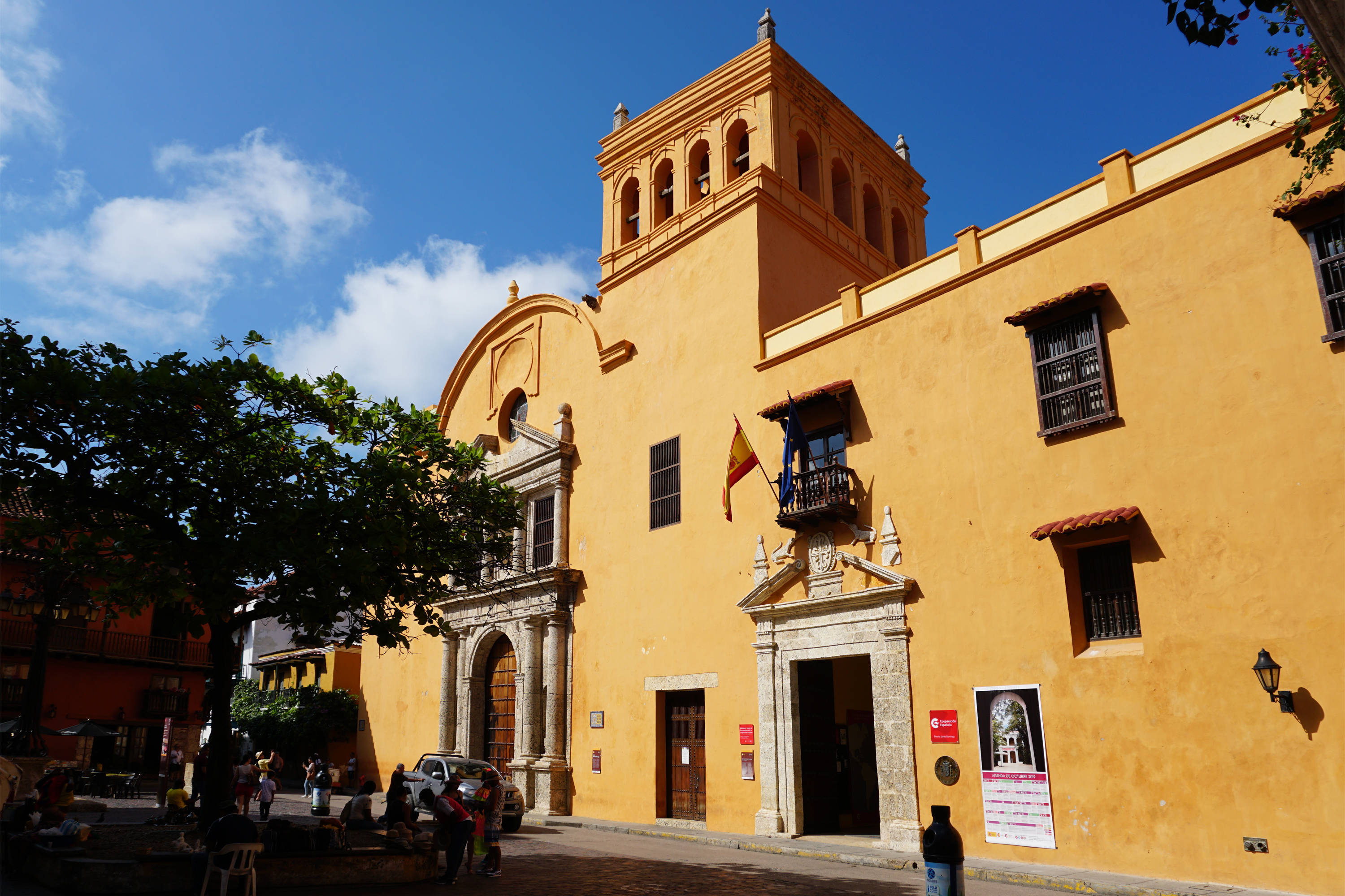 Fachada principal de la Iglesia y Convento de Santo Domingo, Cartagena de Indias